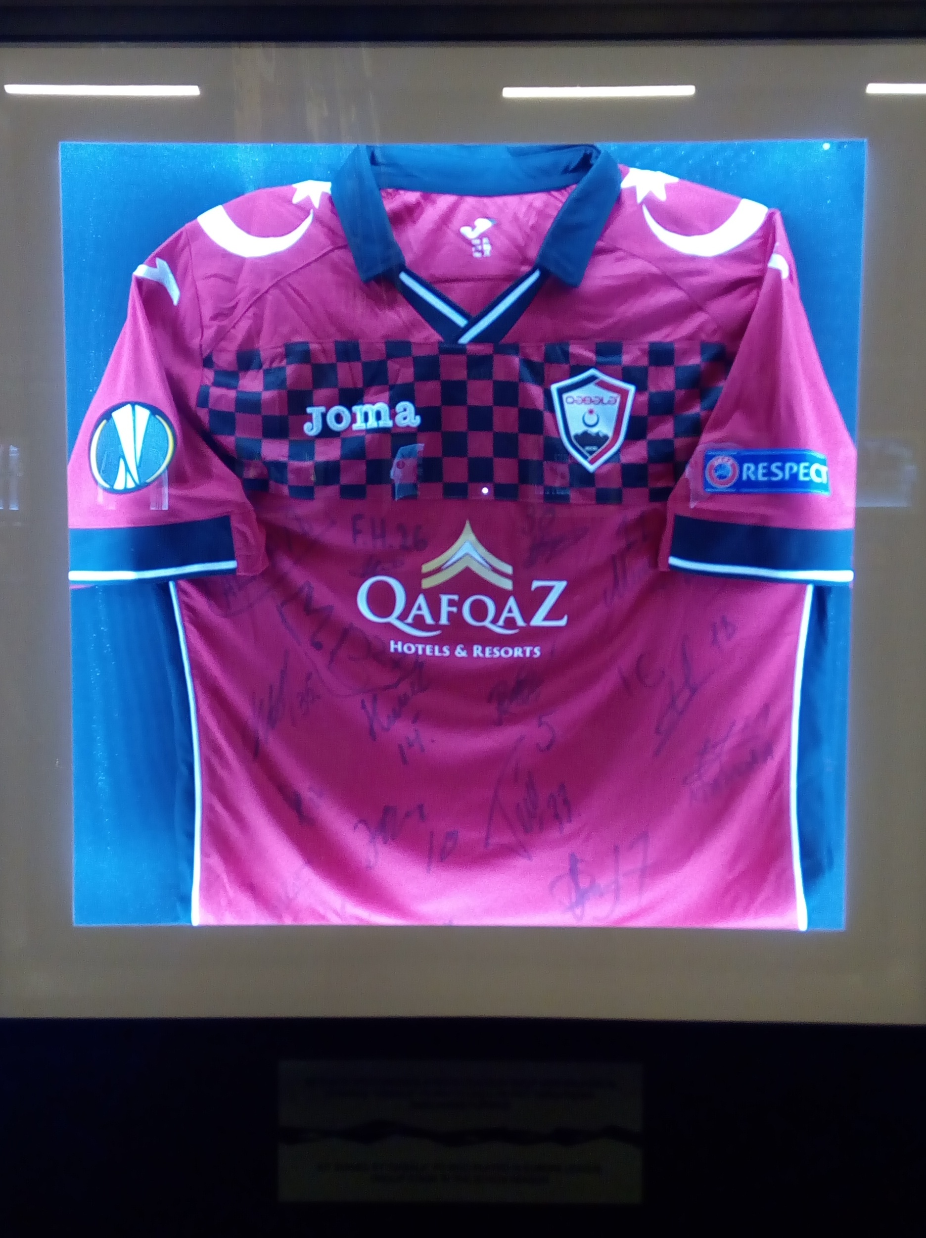 Avropa Liqası Muzeyi Bakıda